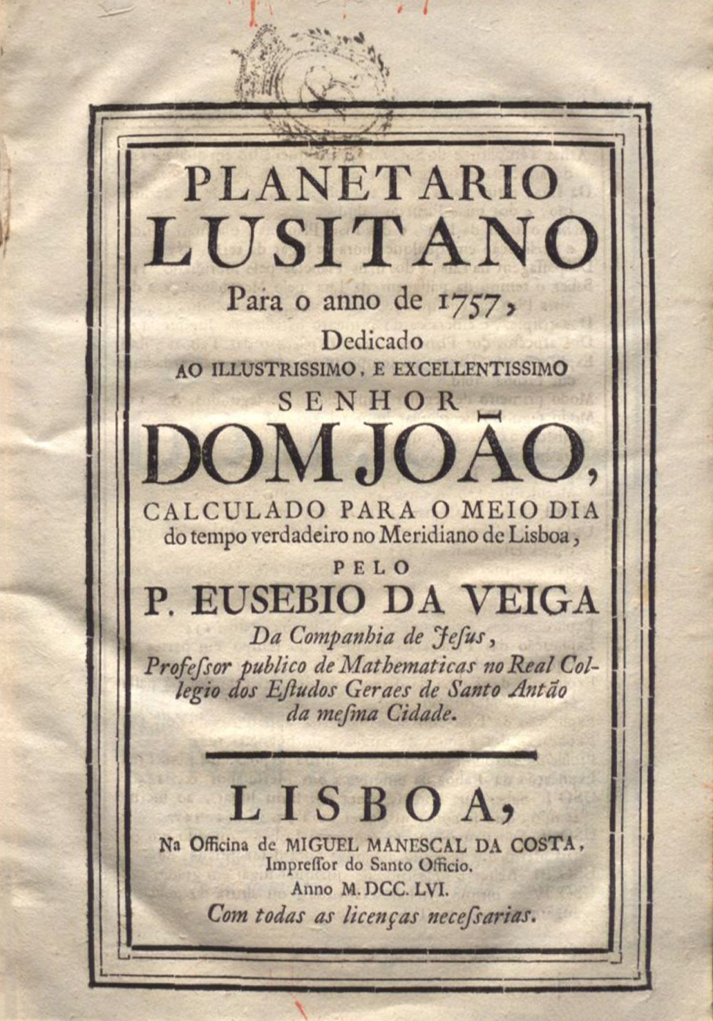 Frontespizio delle Effemeridi portoghesi del 1757